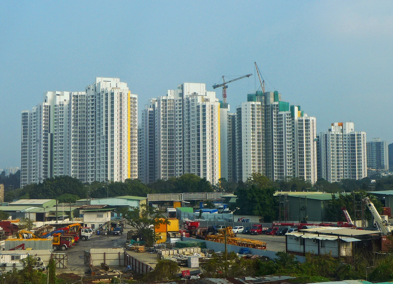 Hung Fuk Estate Site